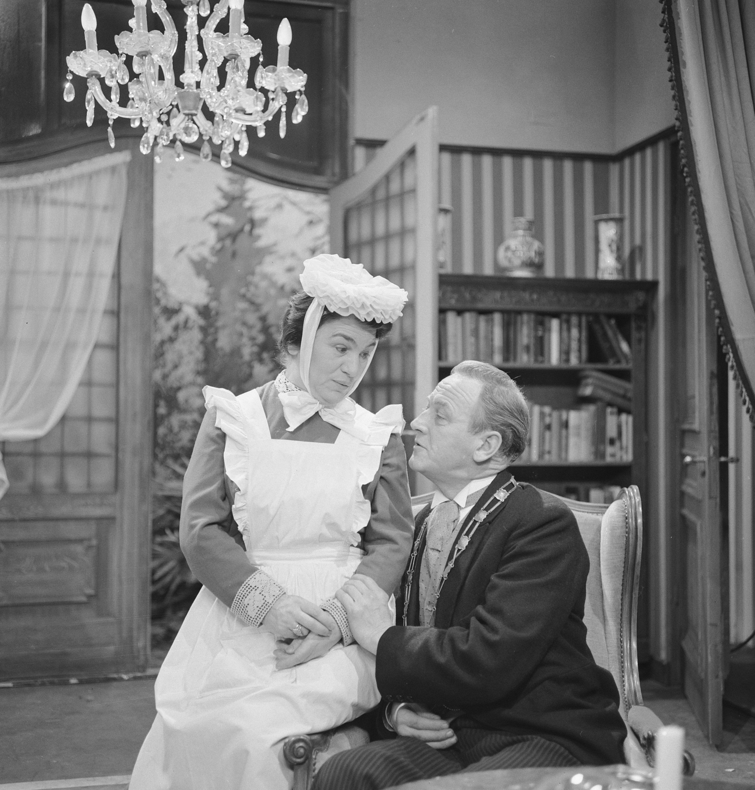 Collectie / Archief : Fotocollectie Anefo Reportage / Serie : [ onbekend ] Beschrijving : Swiebertje. NCRV televisie, Saartje (Jetty Cantor) en burgemeester (Rien van Nunen) Datum : 21 januari 1964 Trefwoorden : programma's, televisies Persoonsnaam : Cantor, Jetty, Nunen, Rien van, Saartje Instellingsnaam : NCRV Fotograaf : Pot, Harry / Anefo Auteursrechthebbende : Nationaal Archief Materiaalsoort : Negatief (zwart/wit) Nummer archiefinventaris : bekijk toegang 2.24.01.03 Bestanddeelnummer : 915-9737